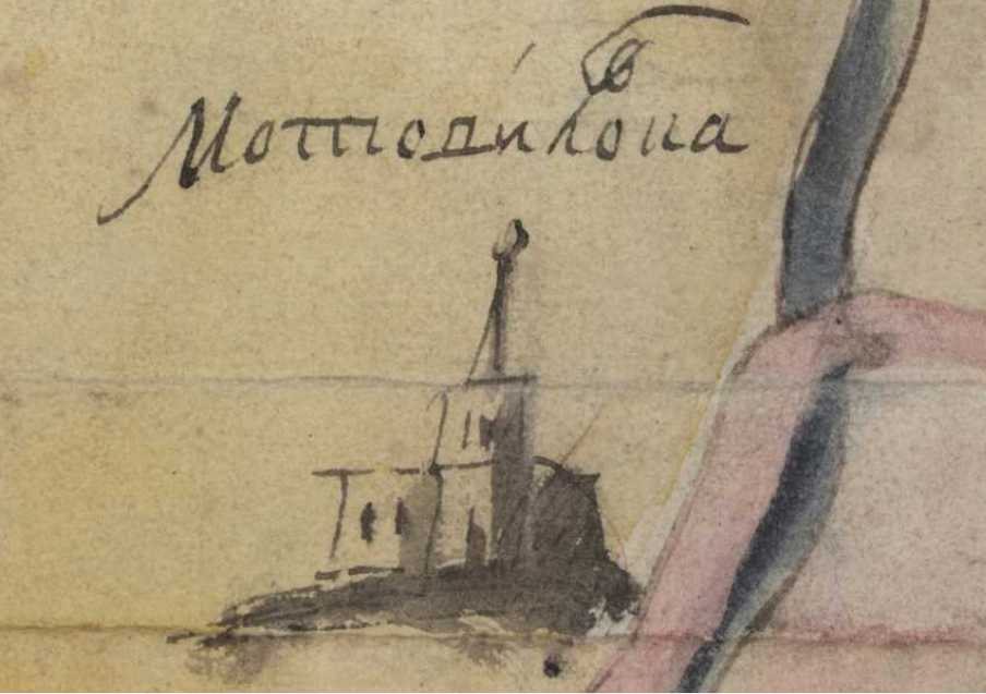 Фрагмент карти Київської губернії. XVIII століття. РГАДА, ф. 192, оп. 1, Киевская губ., № 5.